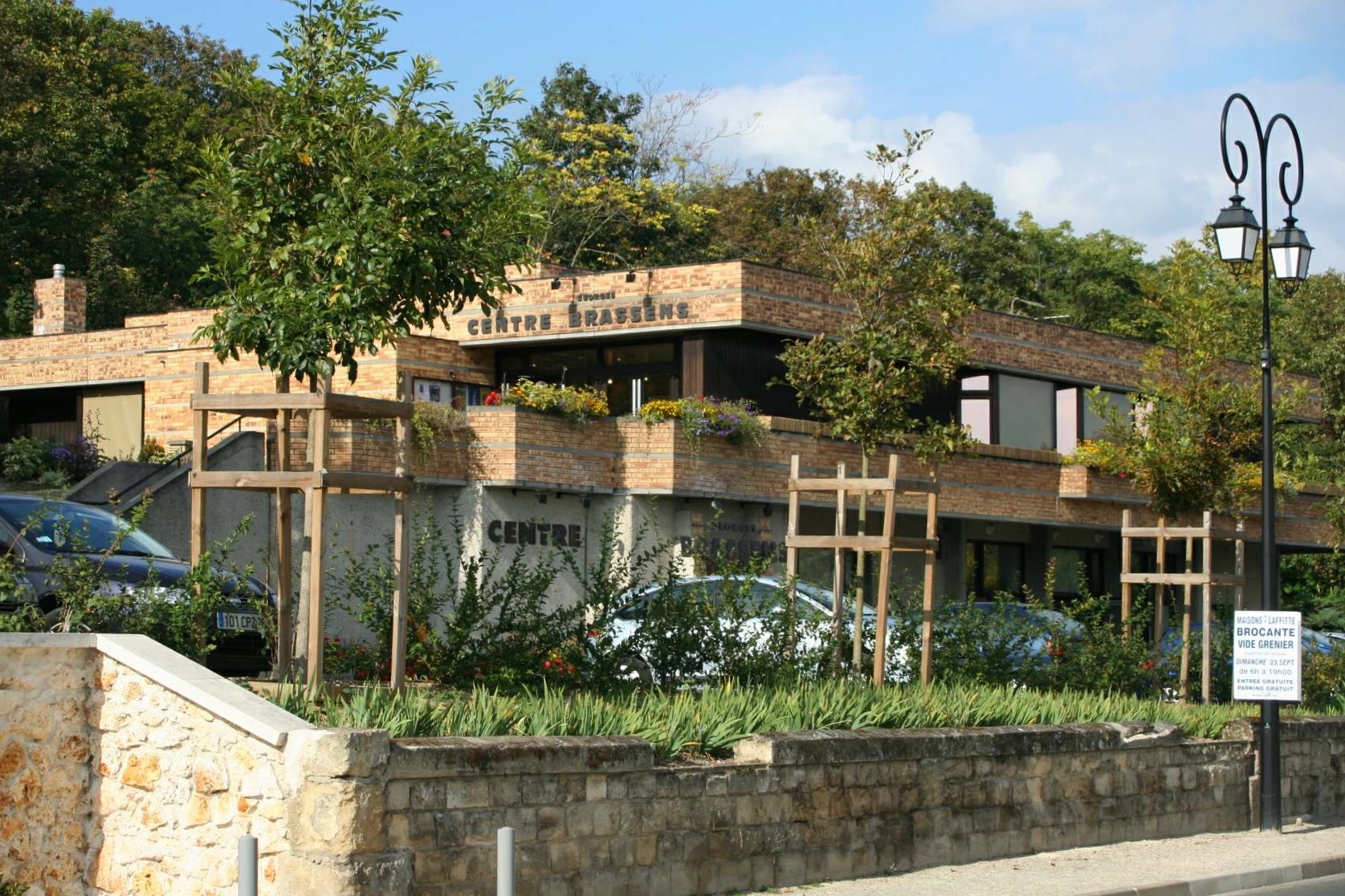 Le centre Brassens (centre culturel) au Mesnil-le-Roi - Yvelines (France)